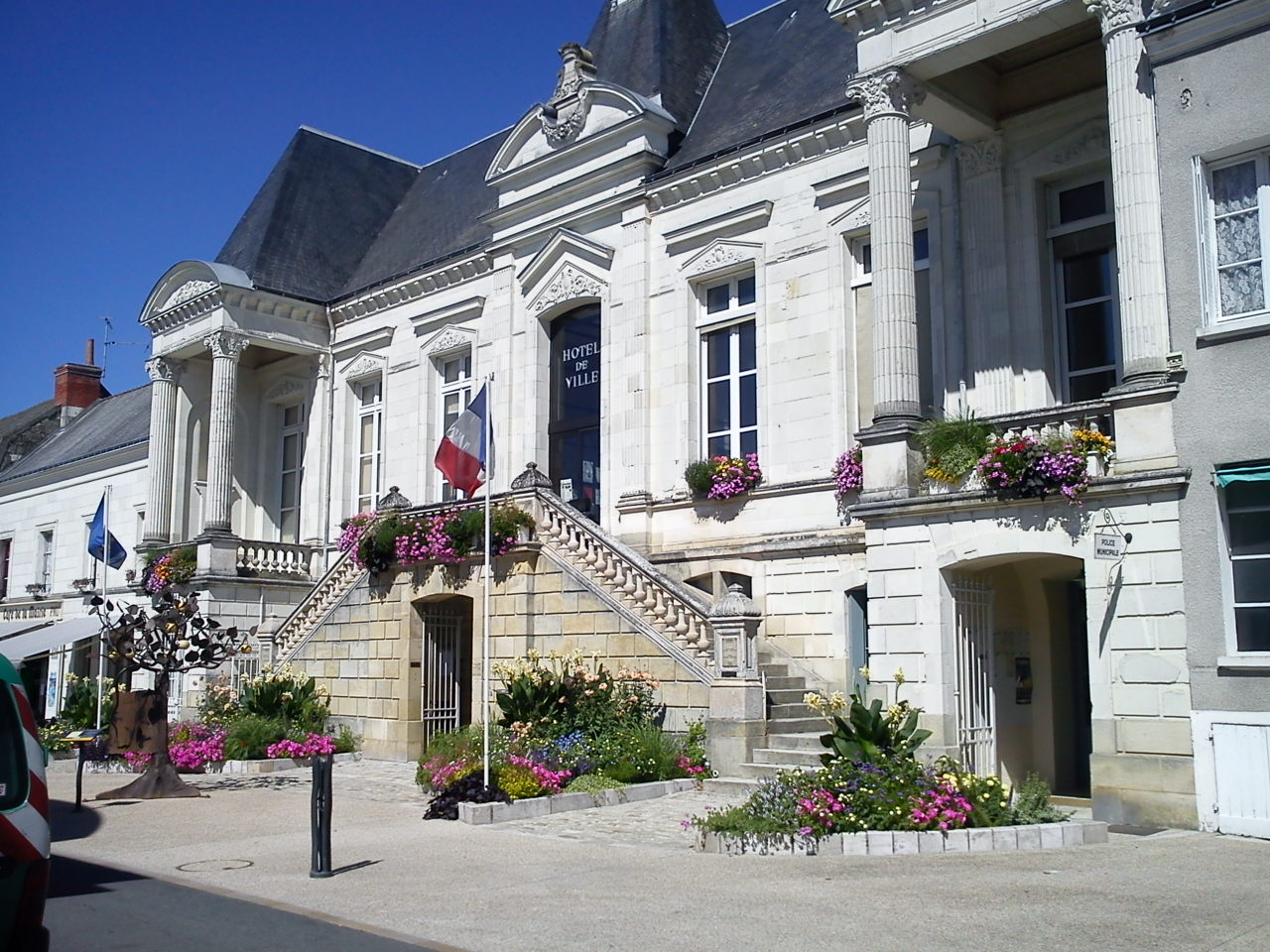 Mairie de Sainte-Maure de Touraine